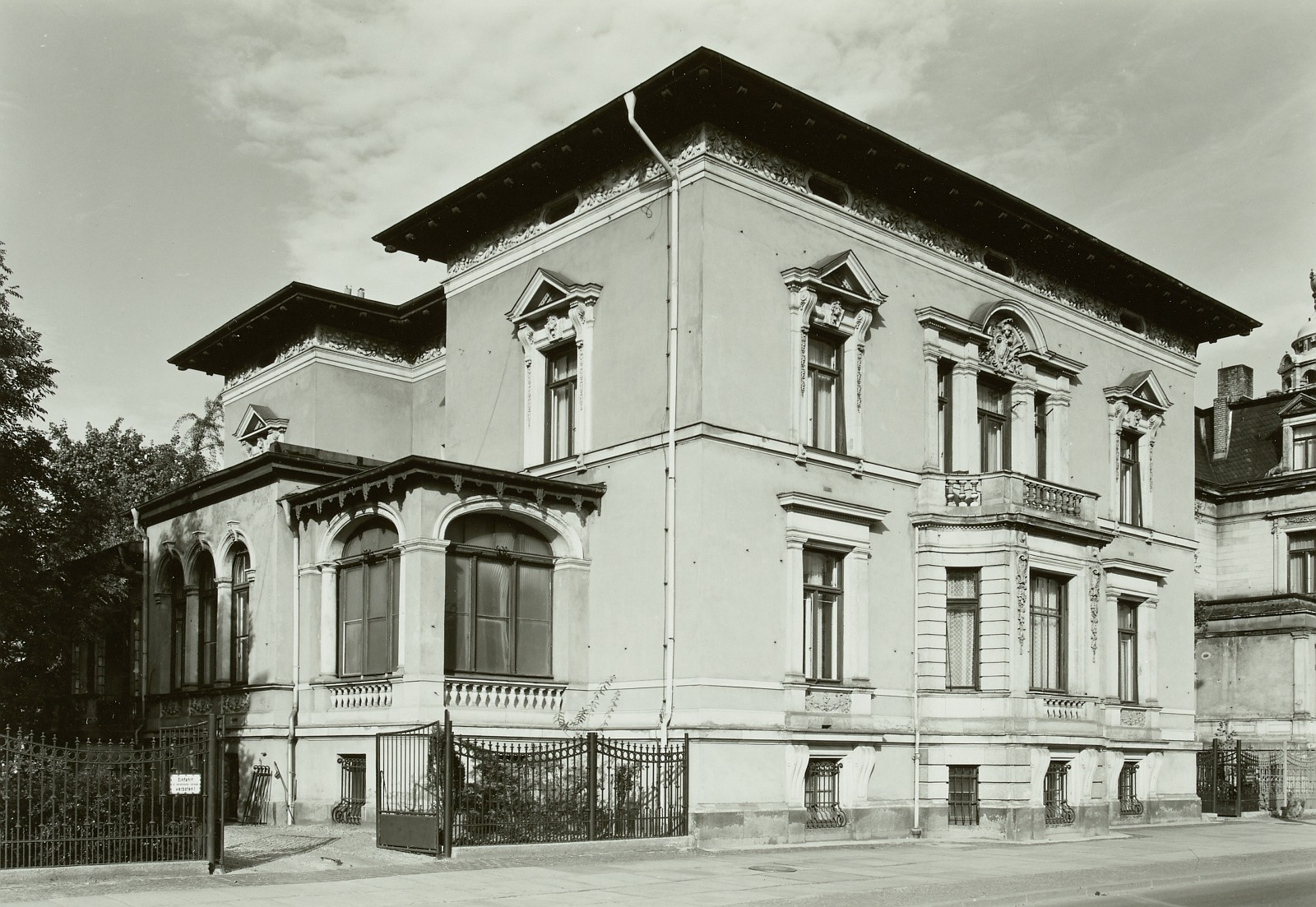 Leipzig, Karl-Tauchnitz-Straße 8 Villa Reißig, zu DDR-Zeiten genutzt als Literaturinstut Johannes R Becher